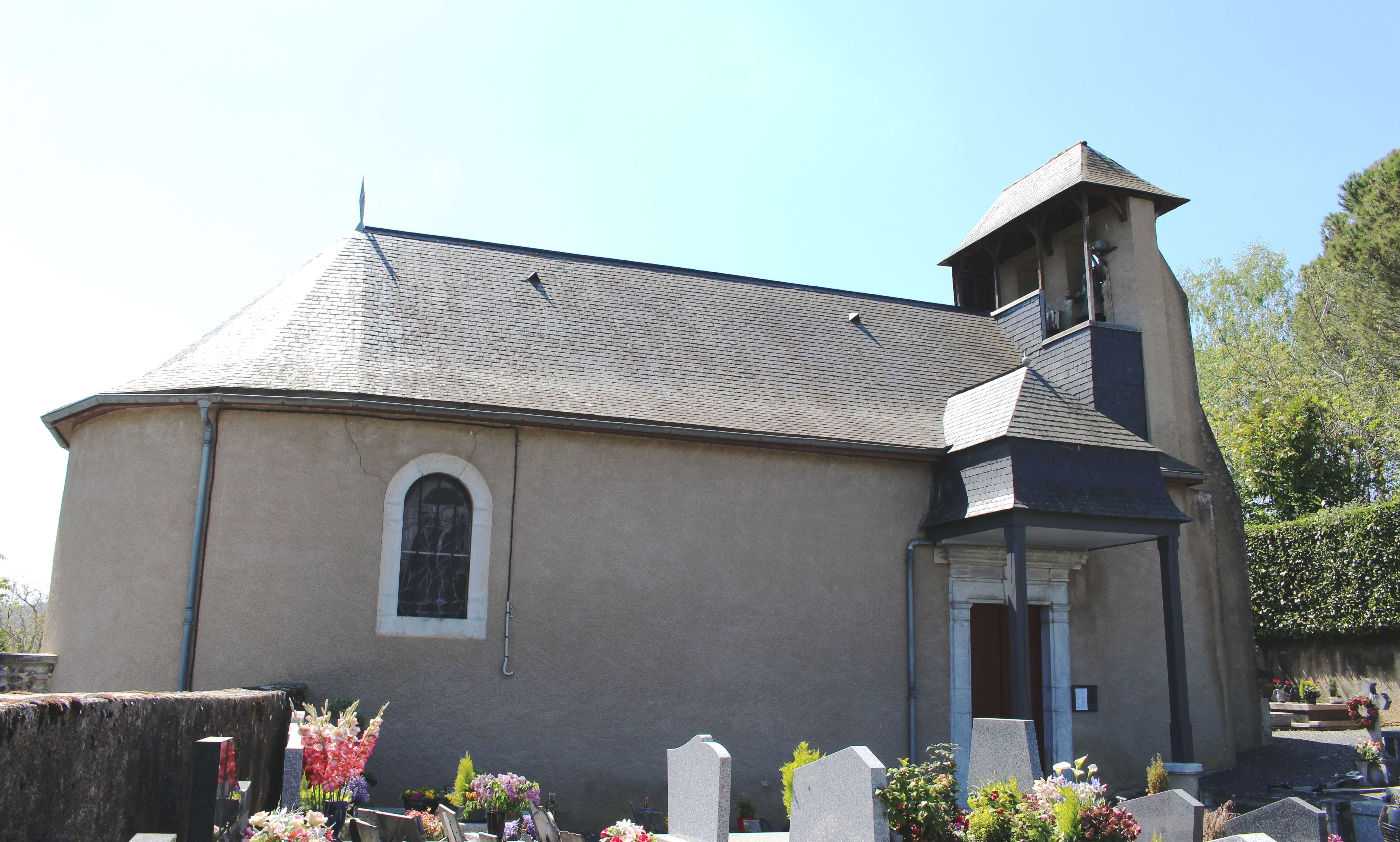 Église Saint-Saturnin d'Angos (Hautes-Pyrénées)